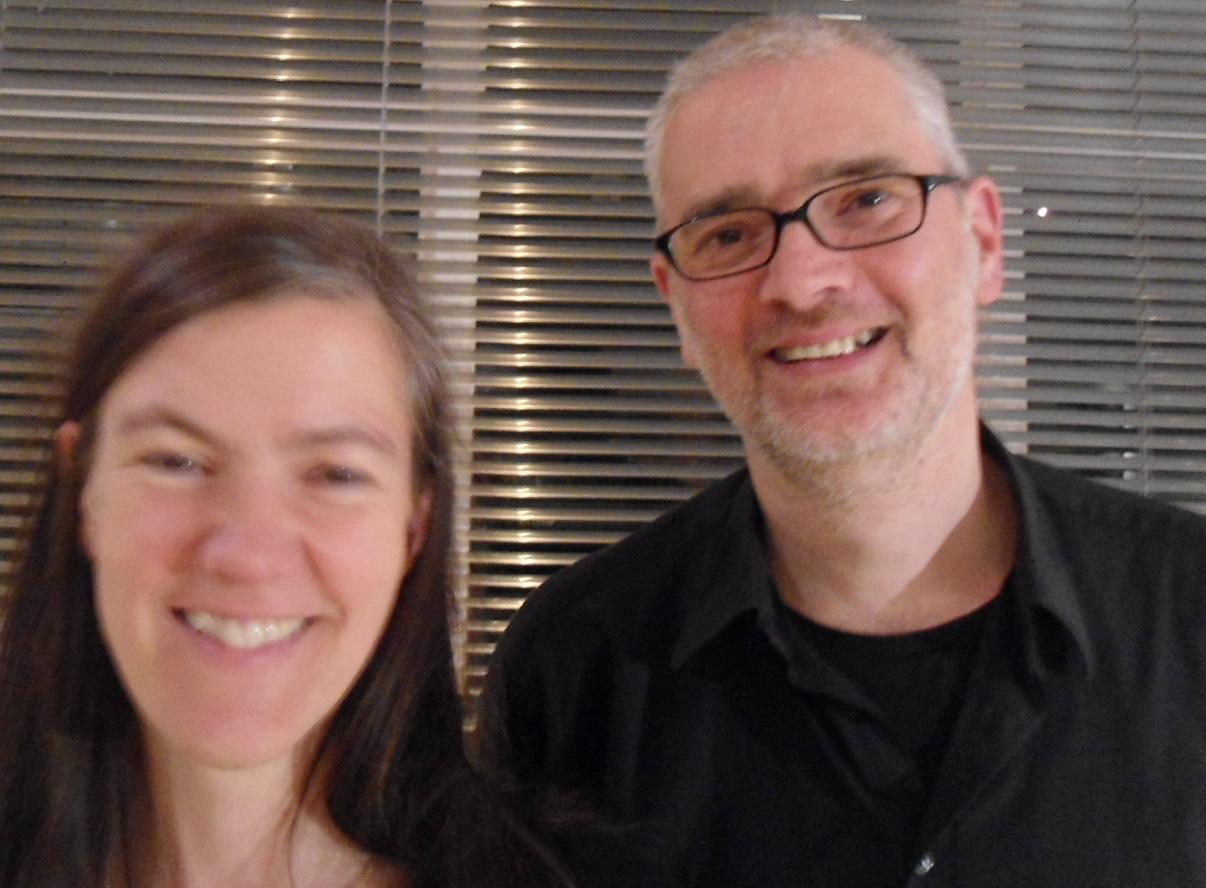 Stefan Scheib & Katharina Bihler, Gründer des Liquid Penguin Ensembles